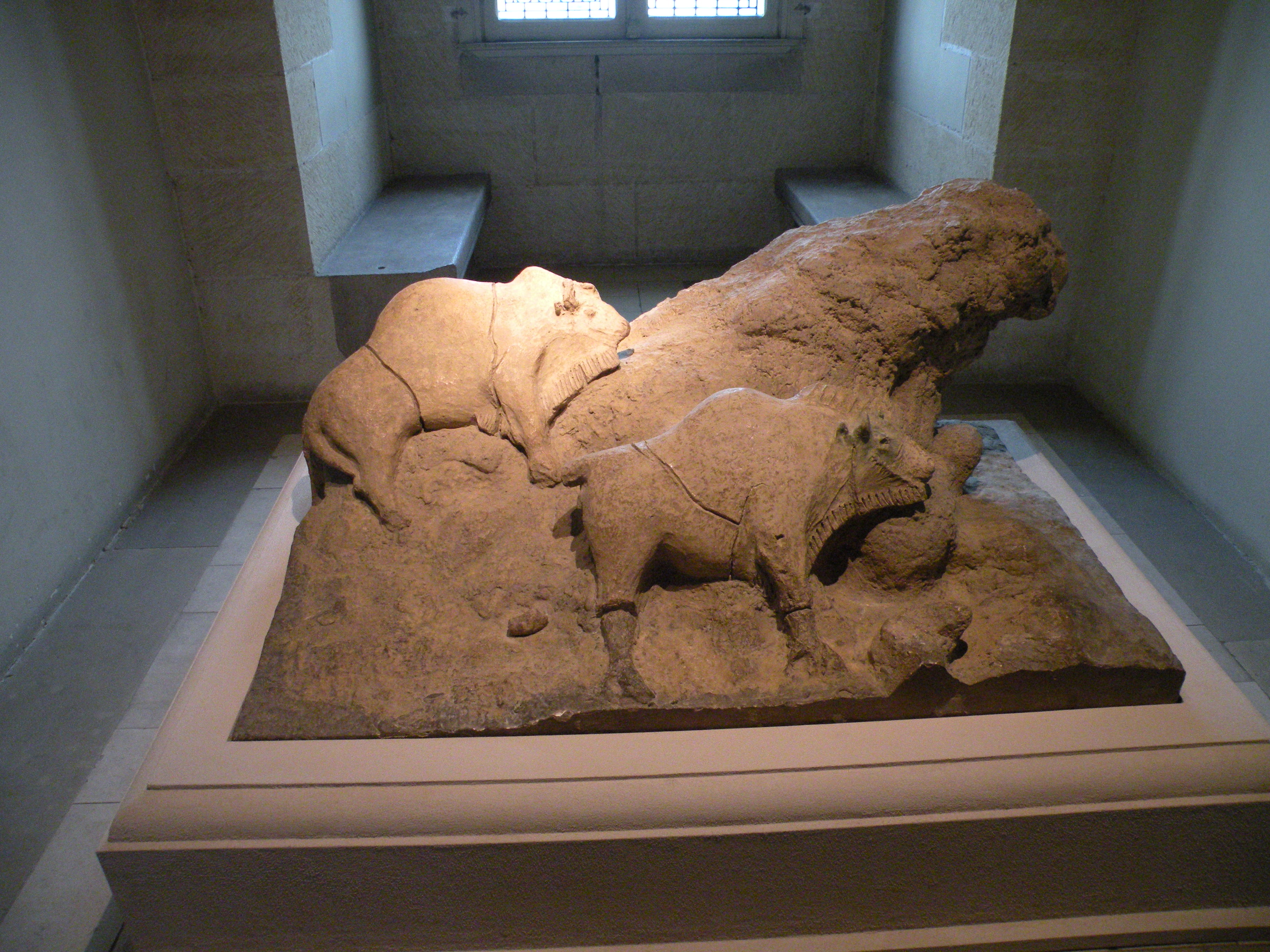 Musée des Antiquités Nationales - copie des bisons d'argile de la grotte du Tuc d’Audoubert.